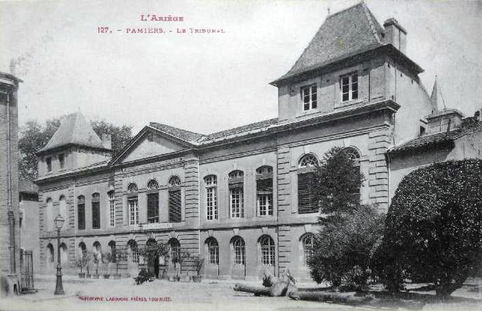 Photographie du Tribunal de Pamiers vers 1900 : l'ancien présidial trop exigu est reconstruit à partir de 1765 et terminé en 1777.